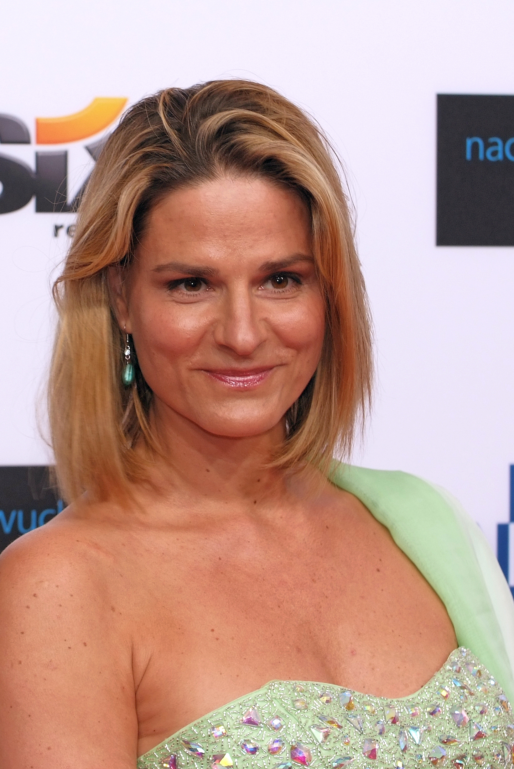 Studio Hamburg Nachwuchspreis 2012